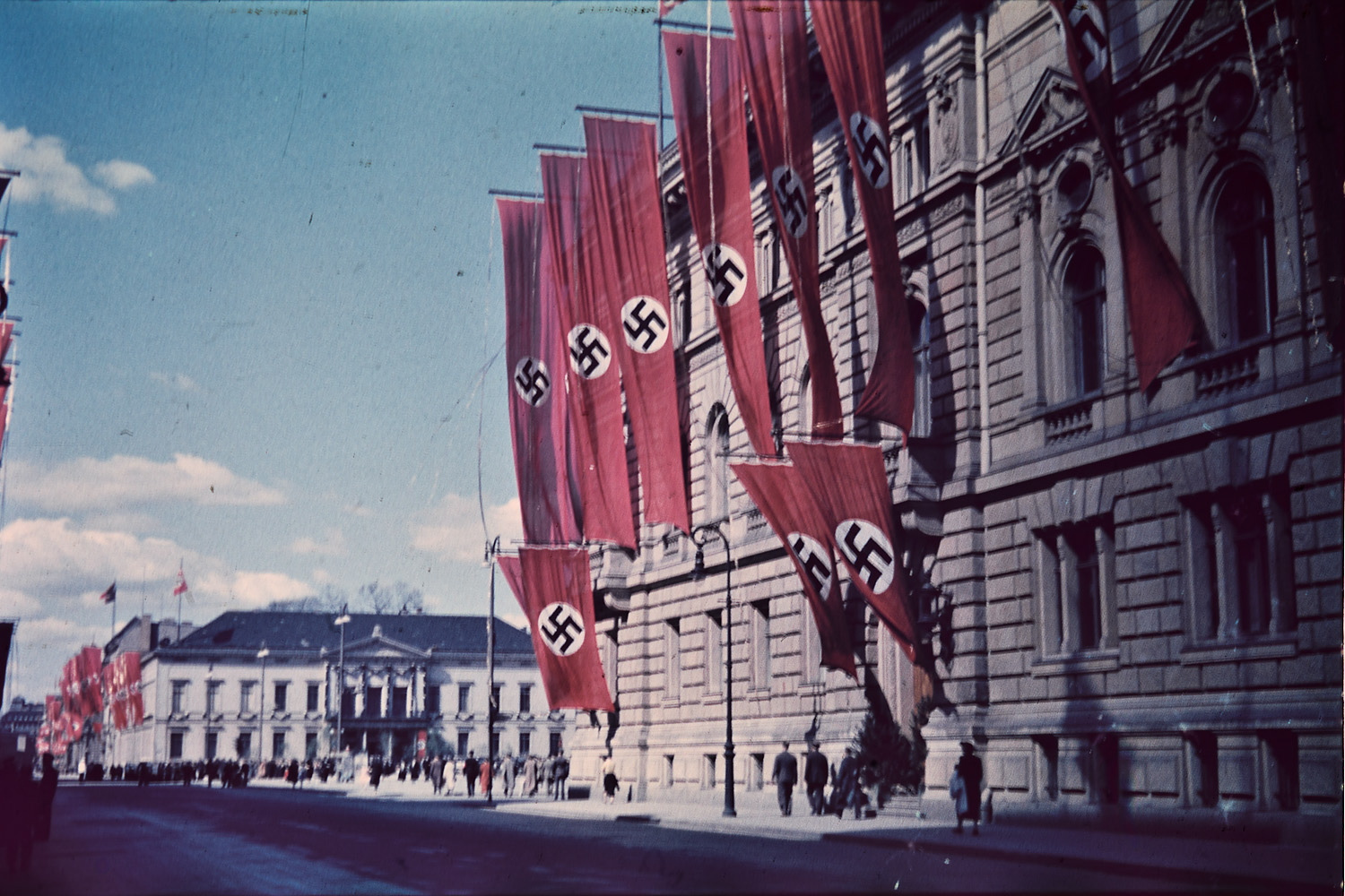 Bildet er hentet fra Arkivverket. Pyntede gater i Berlin, antakelig Arbeidets dag 1. mai. Flagg med hakekors. Fotograf: Thomas Neumann År: 1937 Kamera: Leica Film: Agfa color neu Arkivreferanse: PA1456Ub1_1_1_33 Arkivinstitusjon : Riksarkivet Arkivnavn : Neumann, Thomas Sted : Tyskland, Berlin, Berlin, Emneord: Bymiljø Avbildet